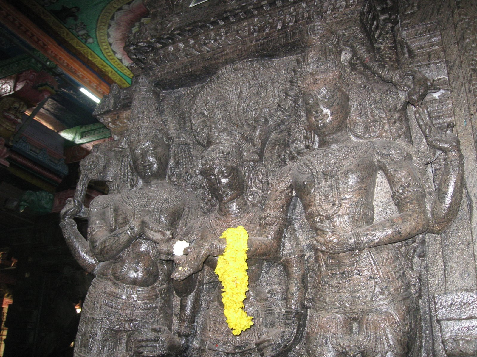 புராணங்களின் பிரபலமான மீனாட்சி சுந்தரேஸ்வரரின் திருமணக் கோலம் மதுரை மீனாட்சியம்மன் கோயிலில் சிலை வடிவில் திகழும் காட்சி.